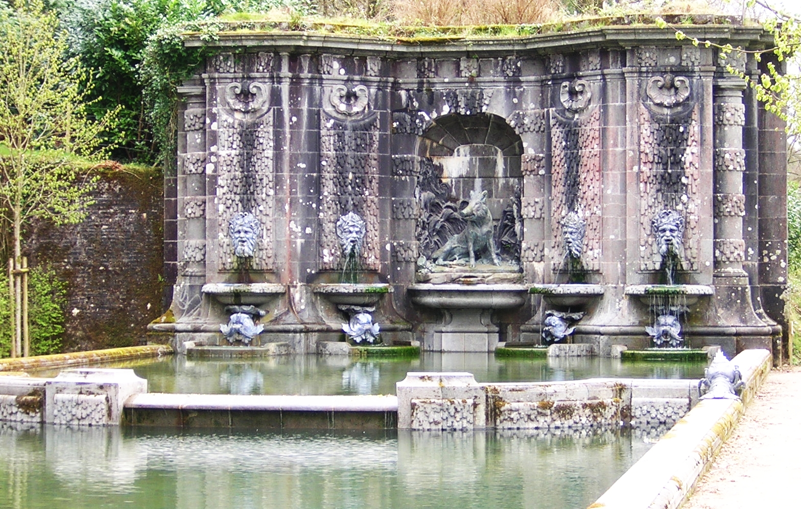 Fontaine dans le parc du Château de Trévarez - Finistère (29), France.